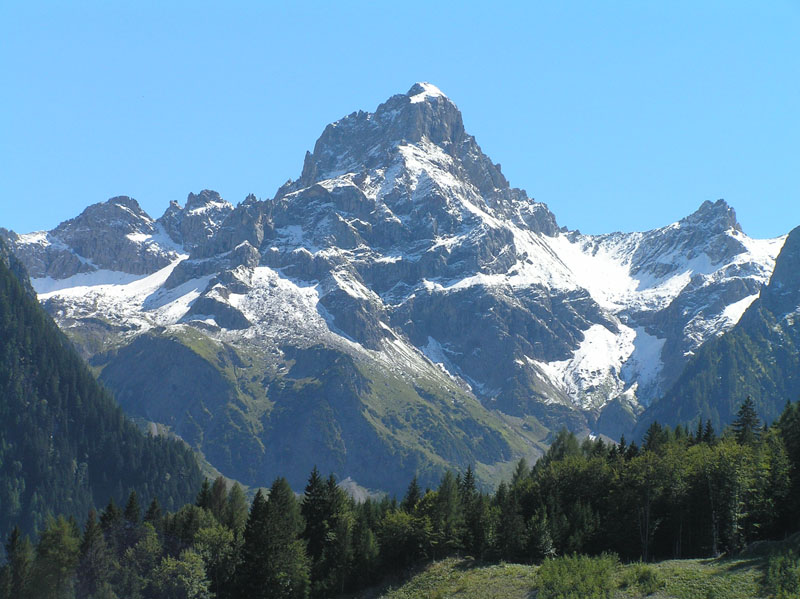 Die Zimba von Nordwesten, von Bürserberg aus gesehen.